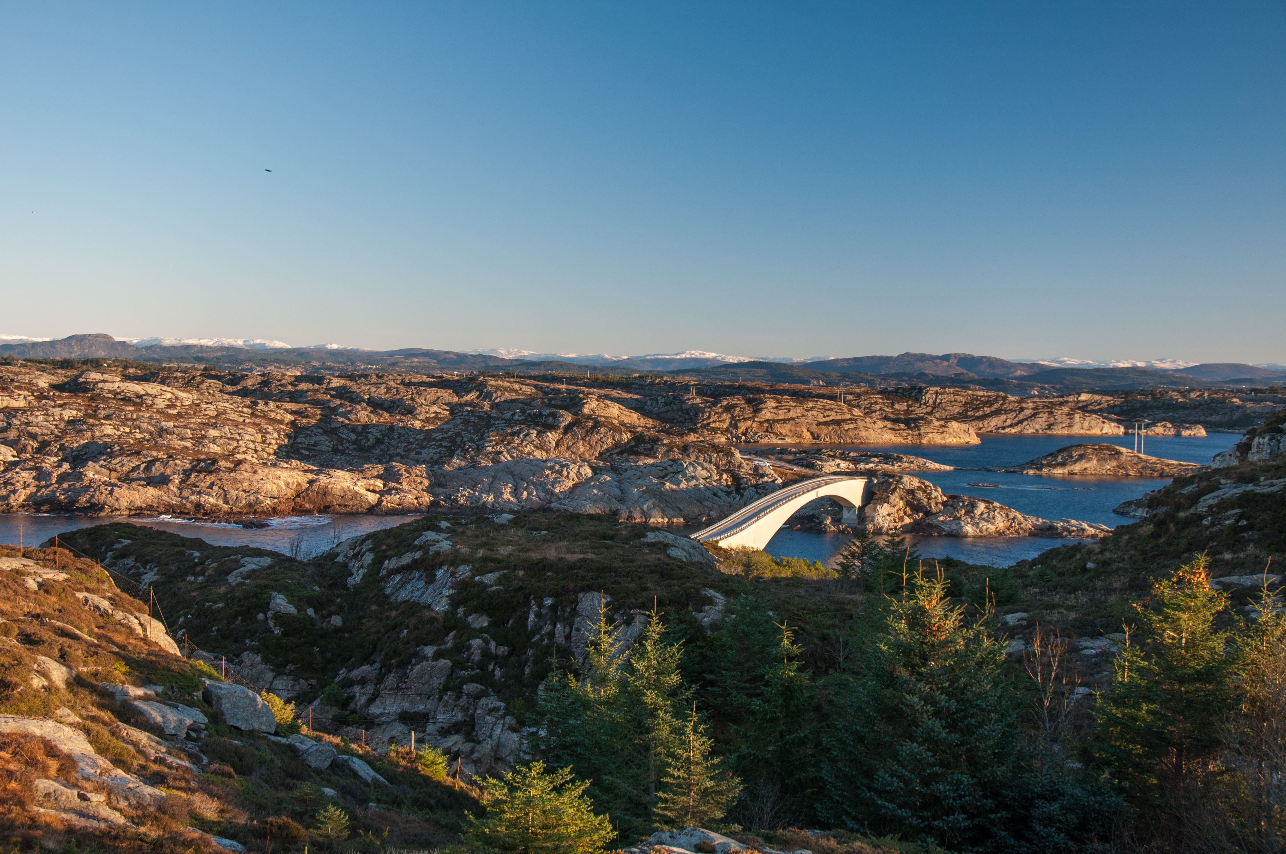 Turøy bridge